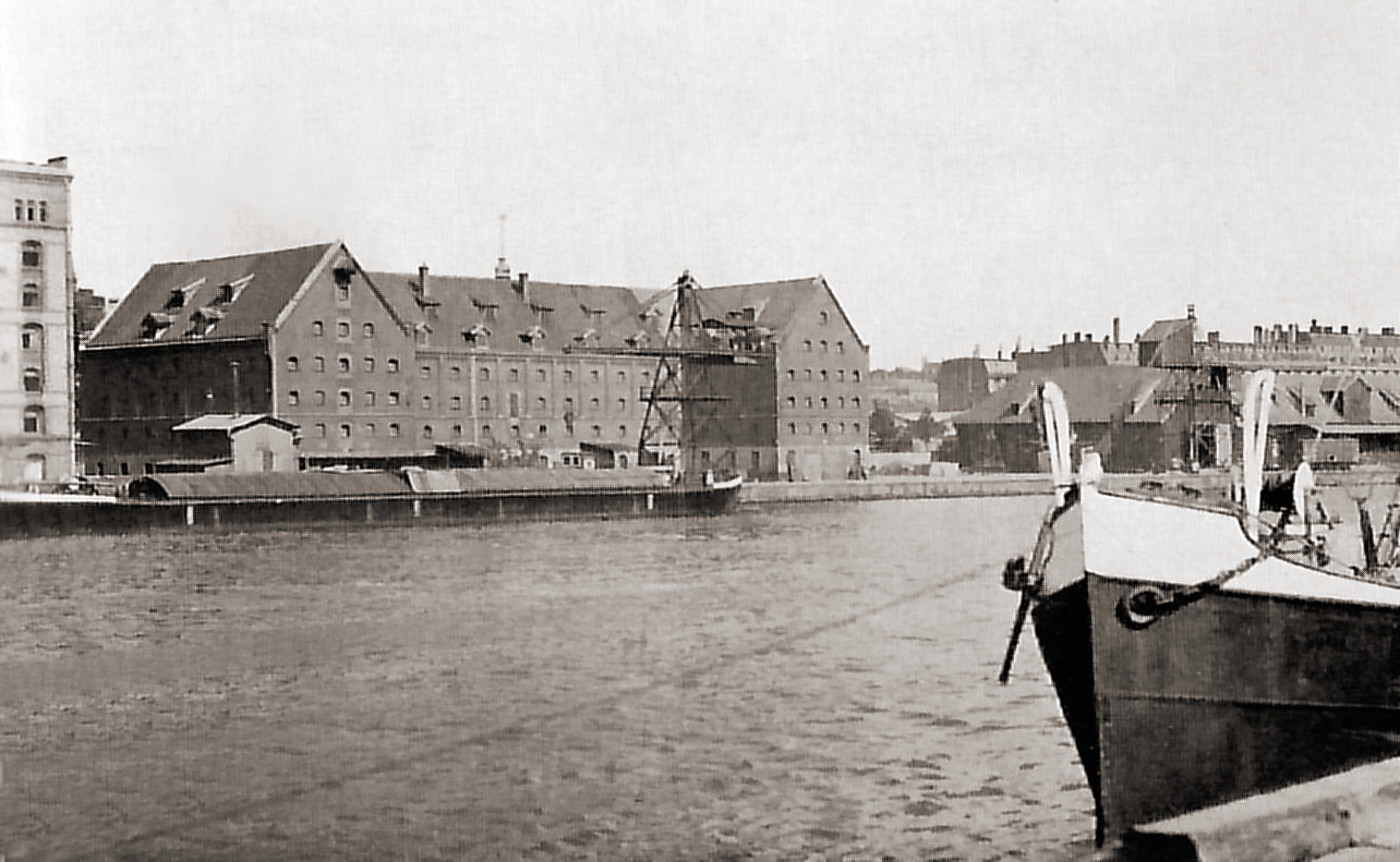 Packhof im Königsberger Hafen